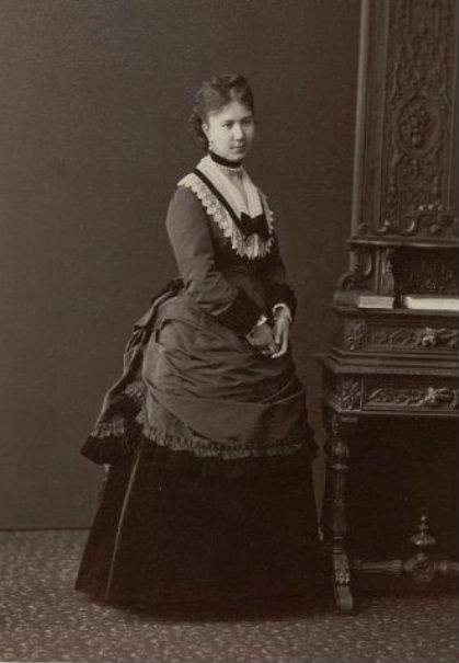 Графиня Ирина Ивановна Воронцова-Дашкова, в замужестве графиня Паскевич-Эриванская.